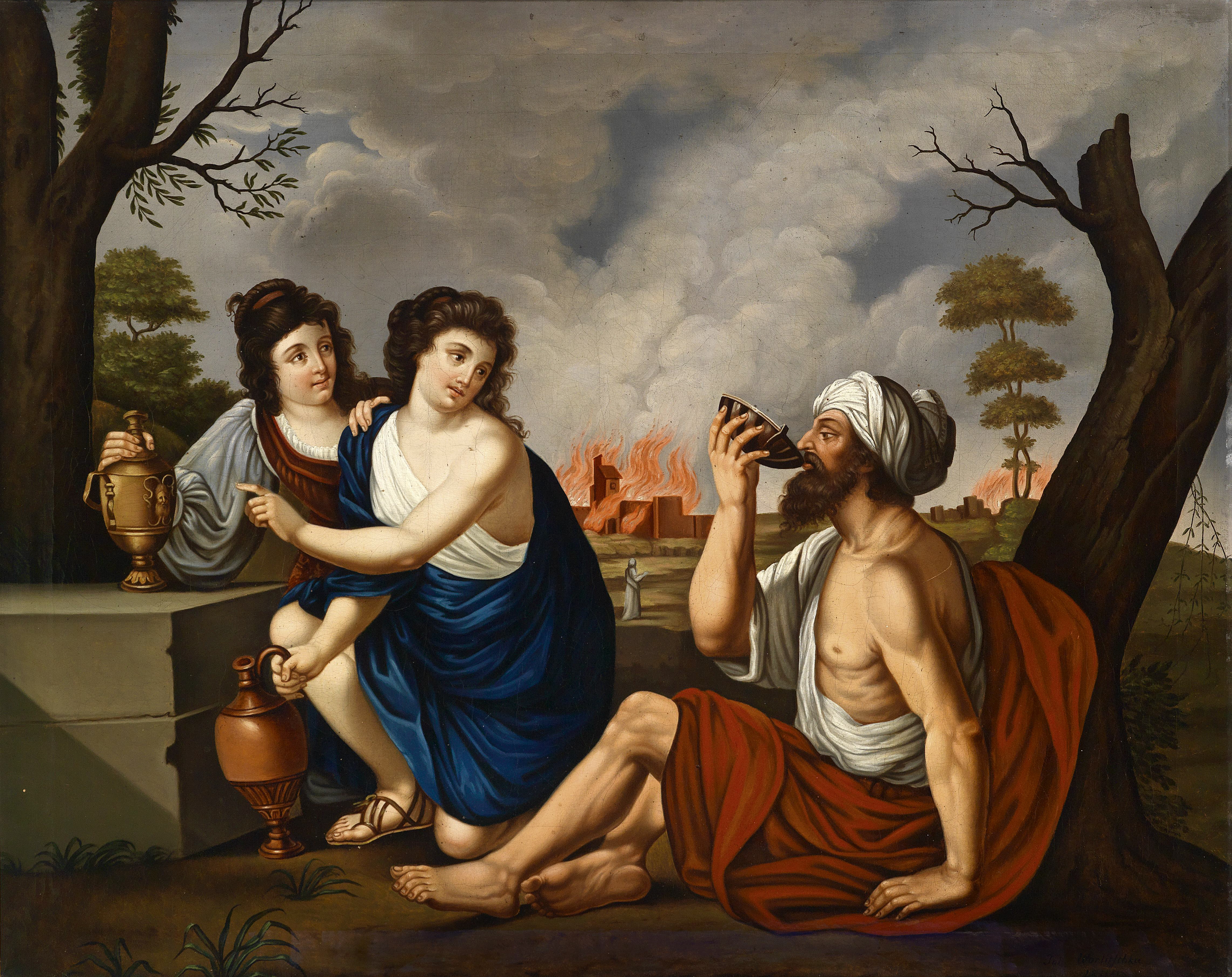 Lot mit seinen Töchtern, im Hintergrund das brennende Gomorrha, signiert und datiert Joh. Worlitjchka 1844, Öl auf Leinwand, 70 x 88 cm